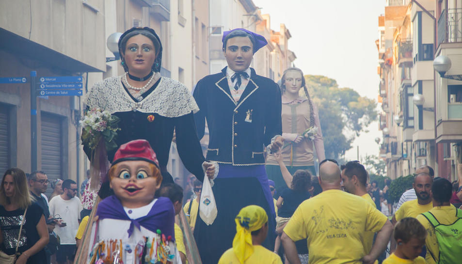 Gegants Pineda, Ton i Donzella (Vila-seca)